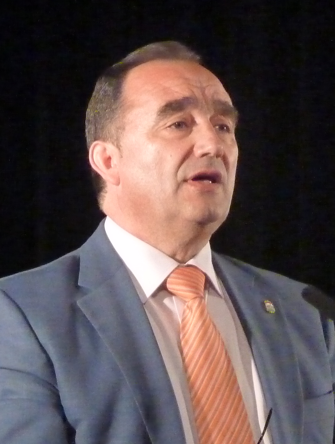 Valentín Cortés Cabanillas, candidato a la alcaldía de Llerena